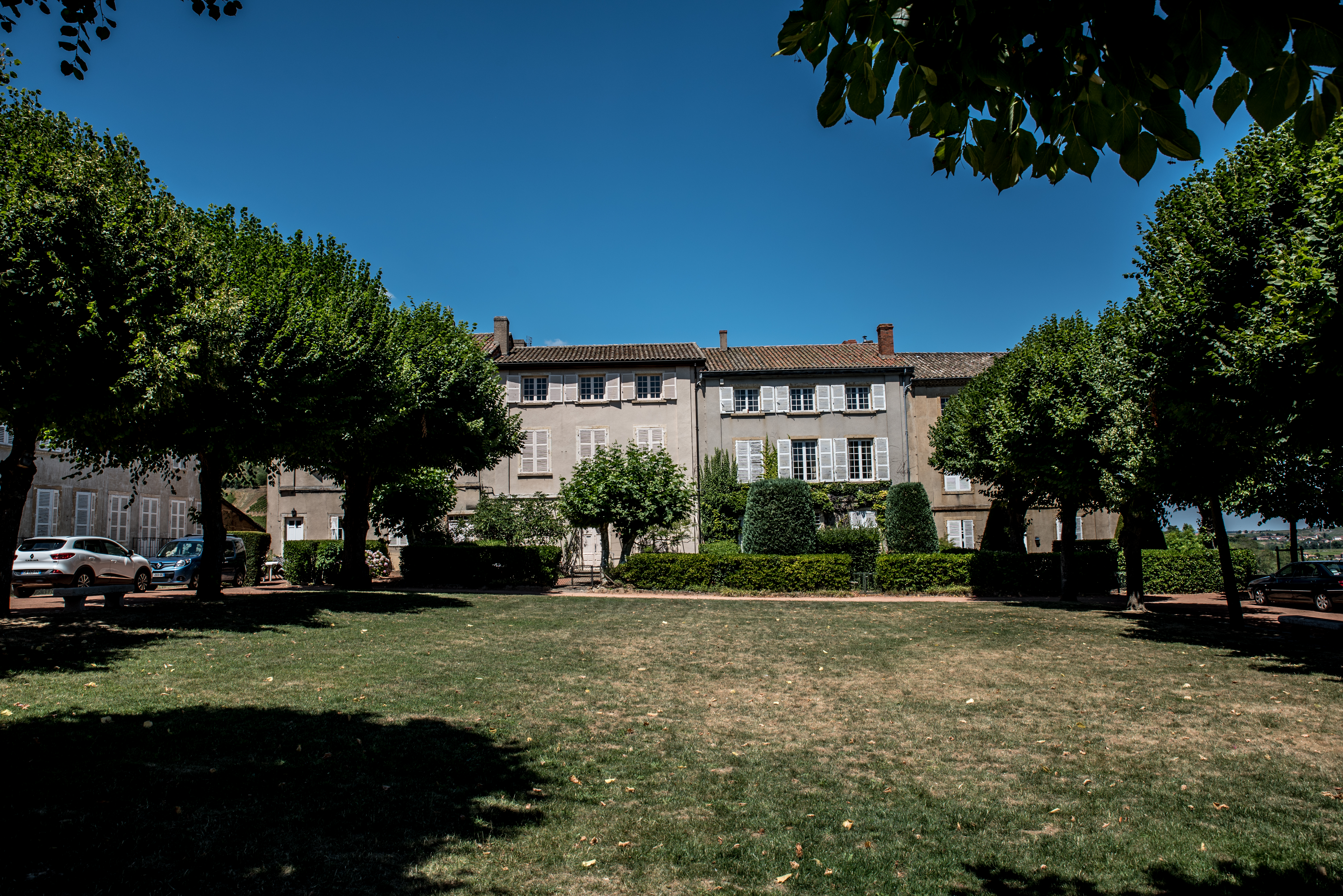 Maisons canoniales du chapitre de Salles-Arbuissonnas-en-Beaujolais - Côté nord